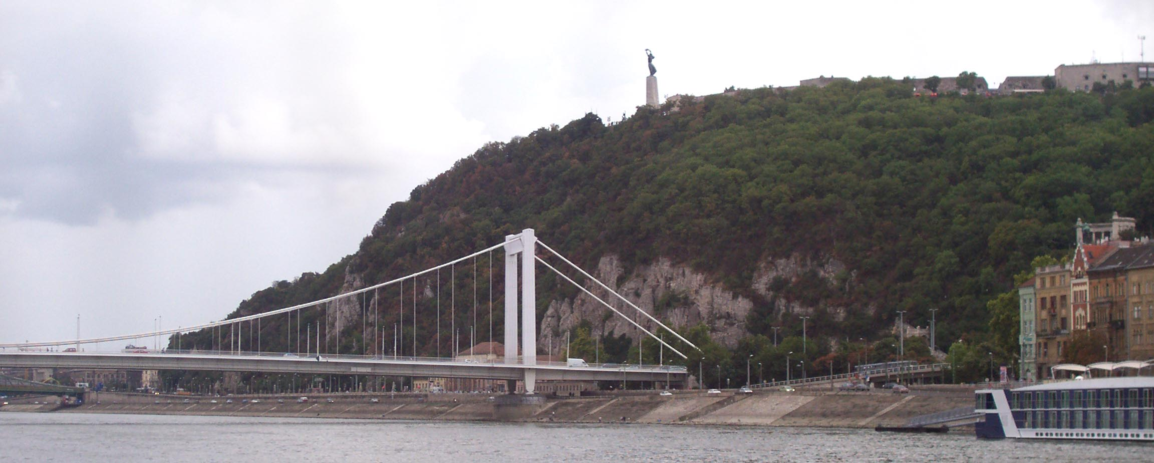 Gellért Hill (Budapest)